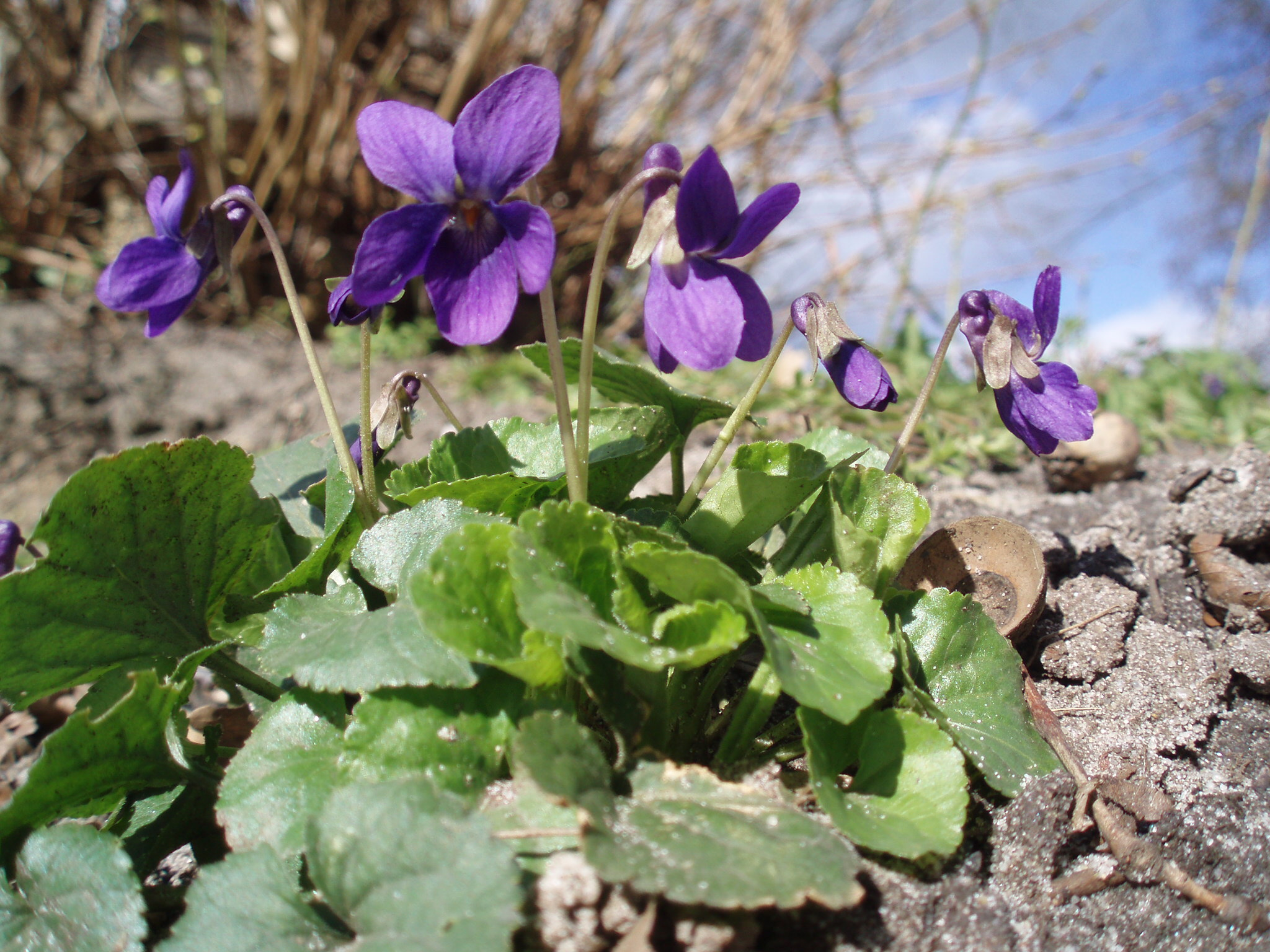 Maarts viooltje (Viola odorata).